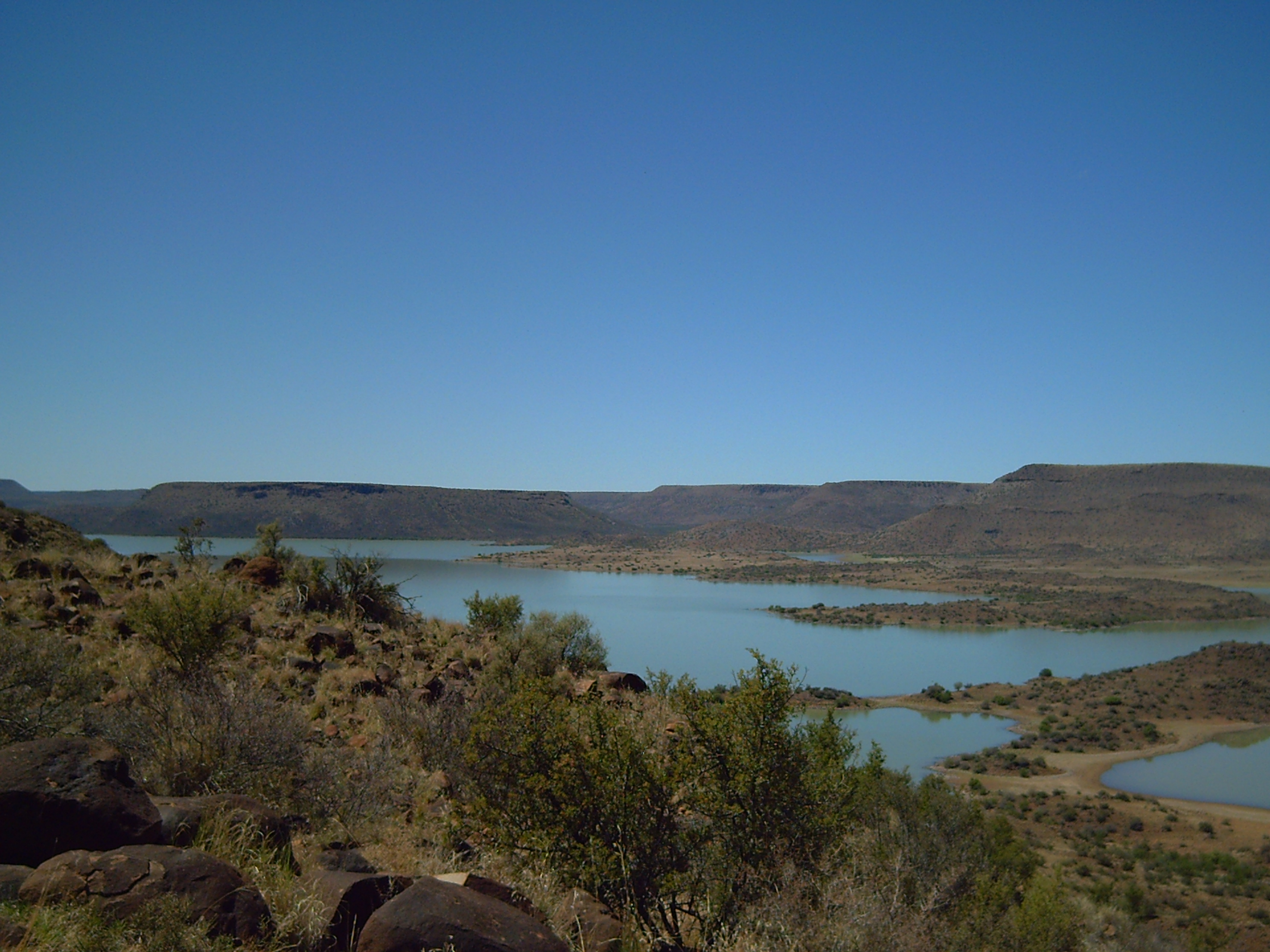 Foto geneem tydens die Afrikaanse Protestantse Kerk Orania se Sondagskooluitstappie na Rolfontein by die Vanderkloofdam (ou P K le Rouxdam) op 15 November 2008.